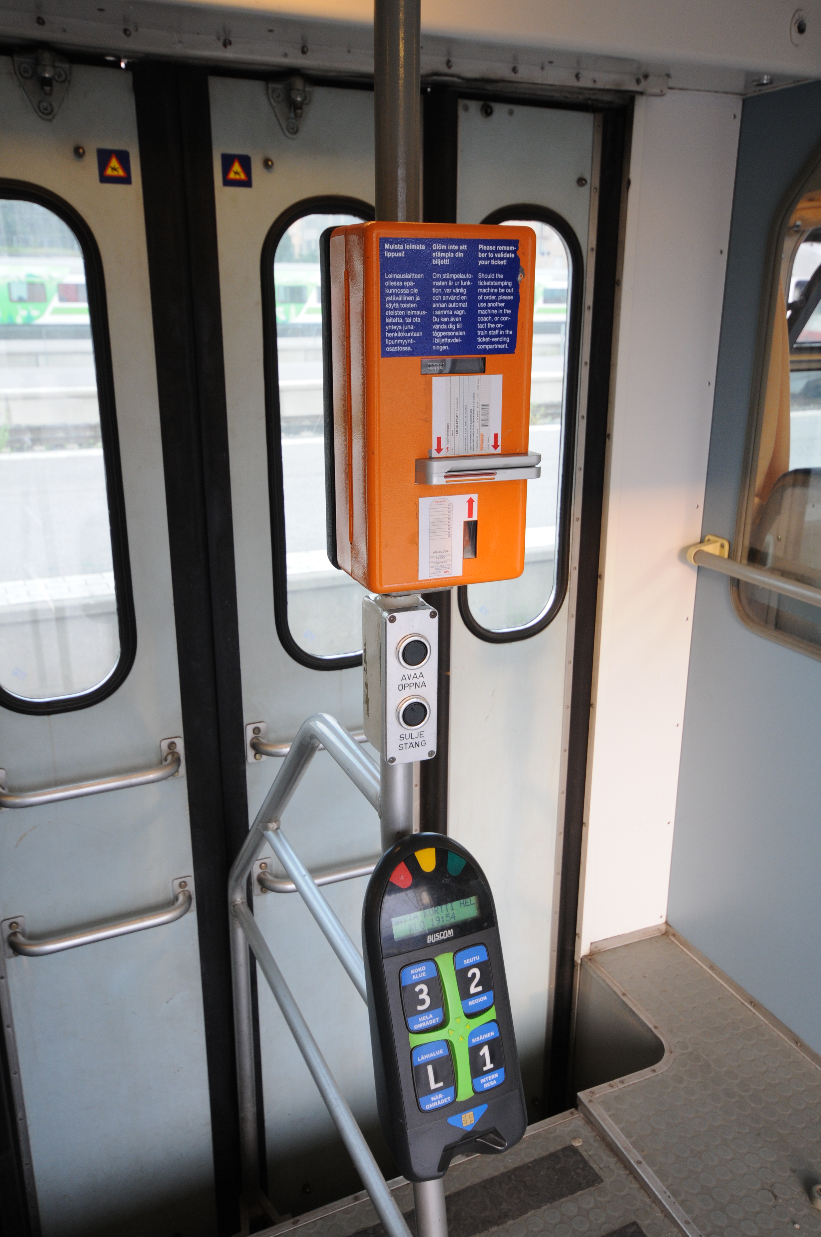 Helsinki Hauptbahnhof